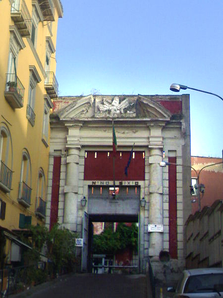 Portale del Gran Quartiere di Pizzofalcone, oggi Caserma Nino Bixio del Reparto Mobile (Napoli)